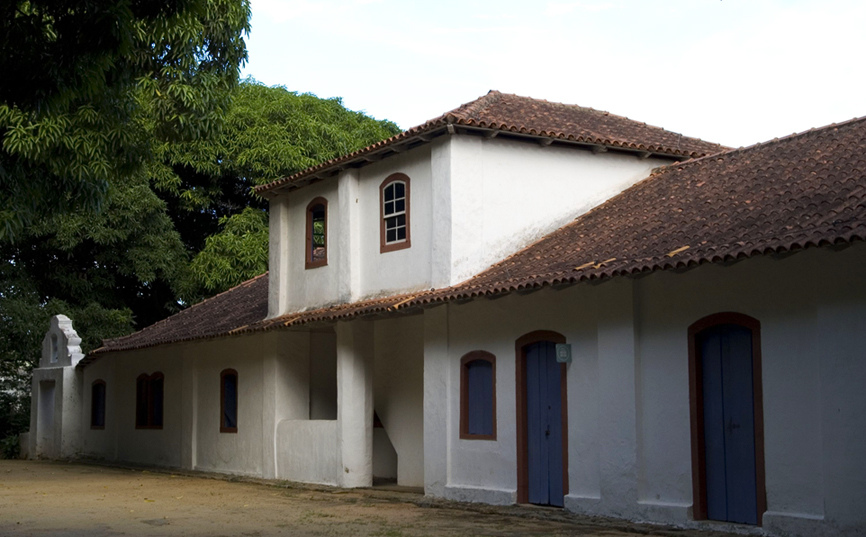 Endereço: Av. Paulino Müller, s/ nº, Jucutuquara – Vitória – ES Tel: +55 (27) 3223-6609 Horários: Terça a sexta das 09h30 às 16h30. Sábados, domingos e feriados das 13h às 17h. A entrada é franca e todas as visitas são monitoradas. O agendamento prévio por telefone é necessário apenas para grupos de 10 ou mais visitantes Foto: Divulgação IBRAM migre.me/cJCxT